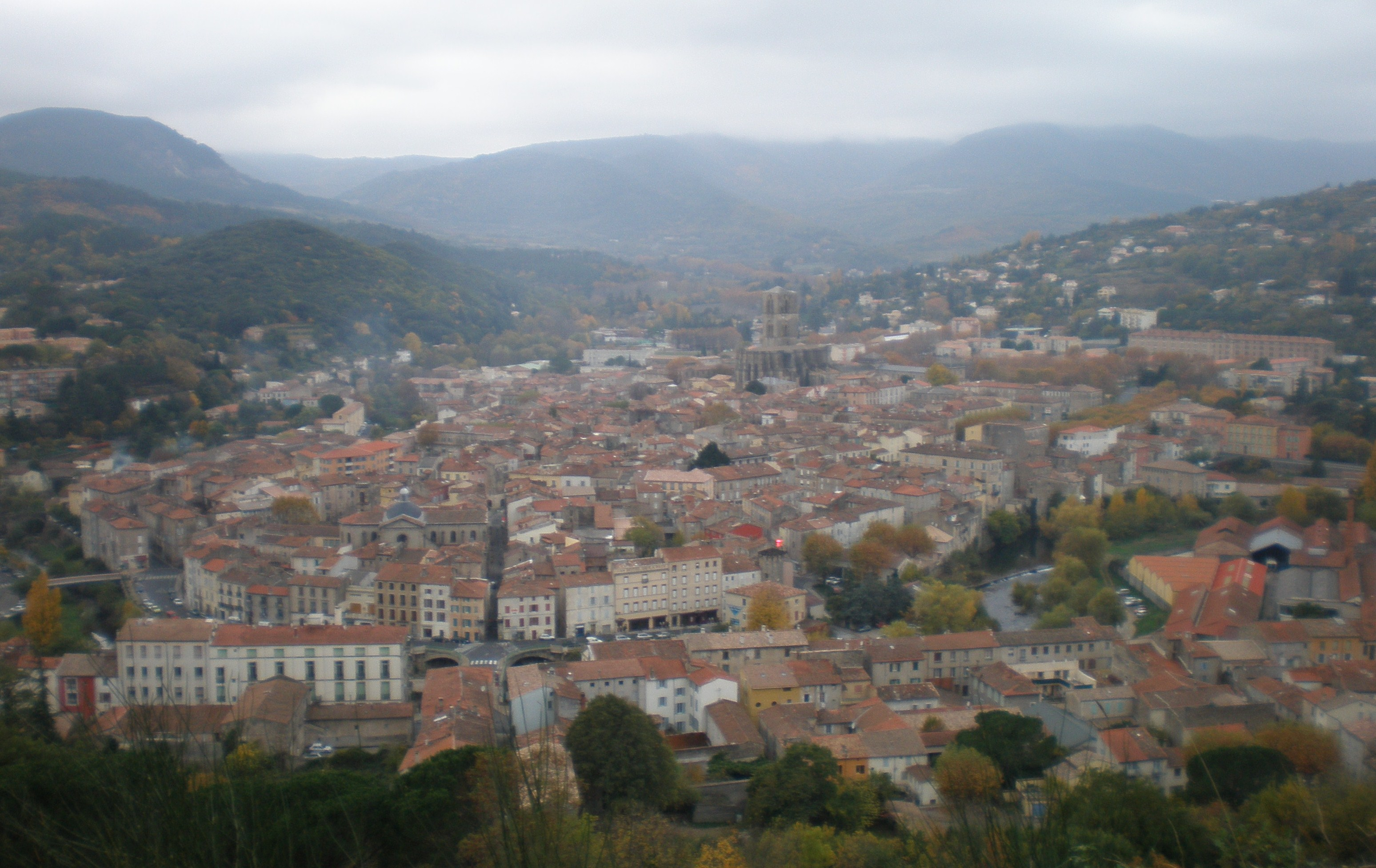 Vue générale de la ville de Lodève (Hérault)